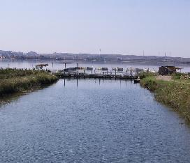 Il canale di Acquarotta,che divide il Mar Adriatico dal Lago di Lesina.